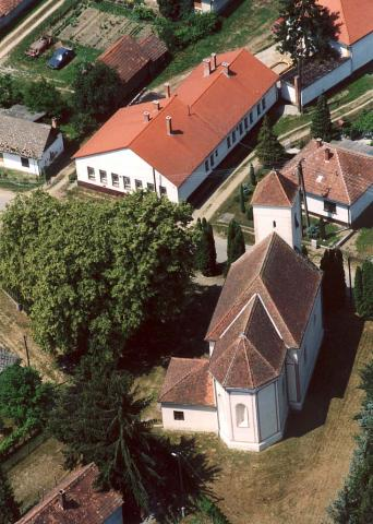 Csesztreg, Hungary, aerial photography. Szent Móric római katolikus templom